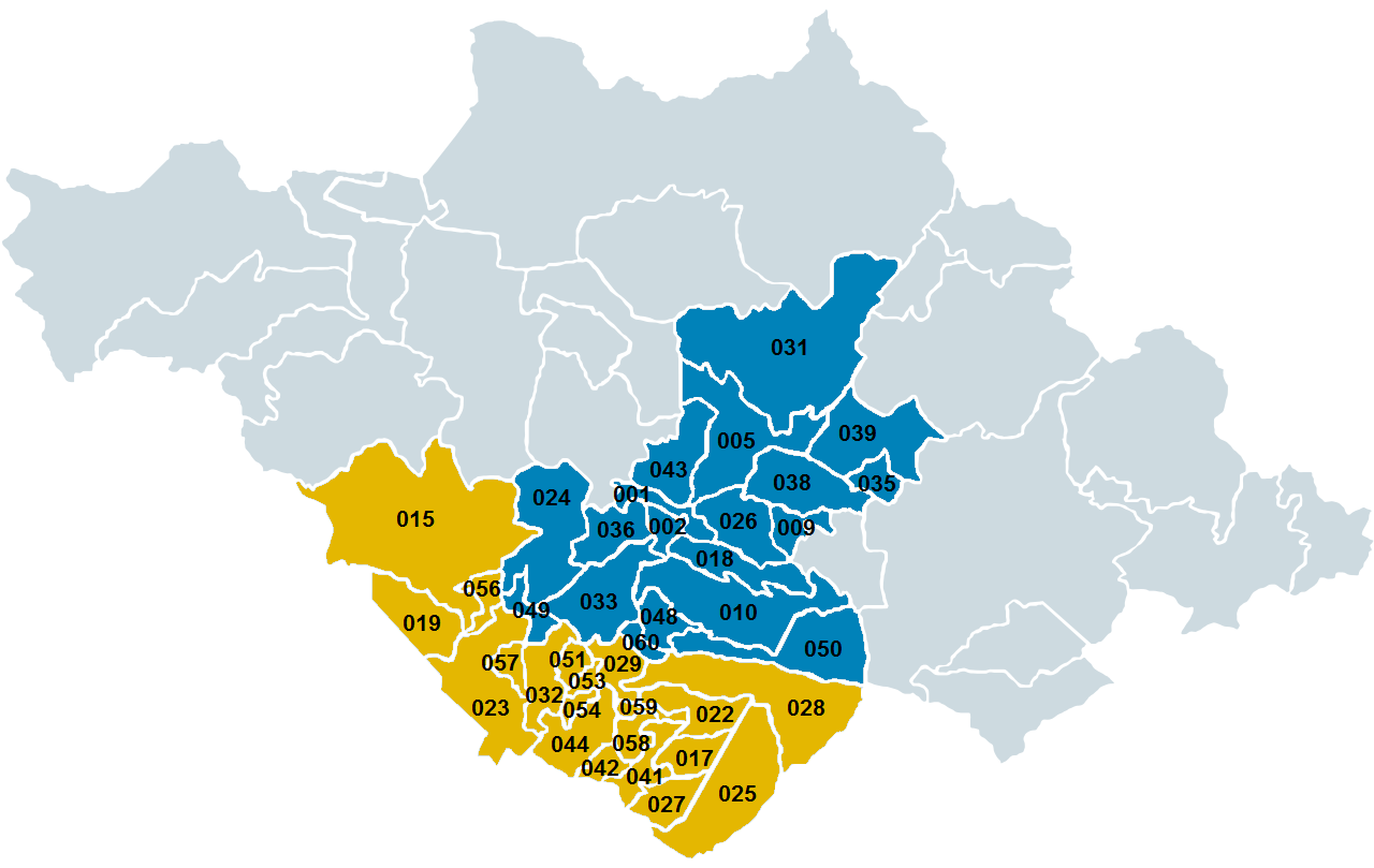 Zonas metropolitanas del estado de Tlaxcala. Azul: Zona metropolitana de Tlaxcala-Apizaco Amarillo: Zona metropolitana de Puebla-Tlaxcala